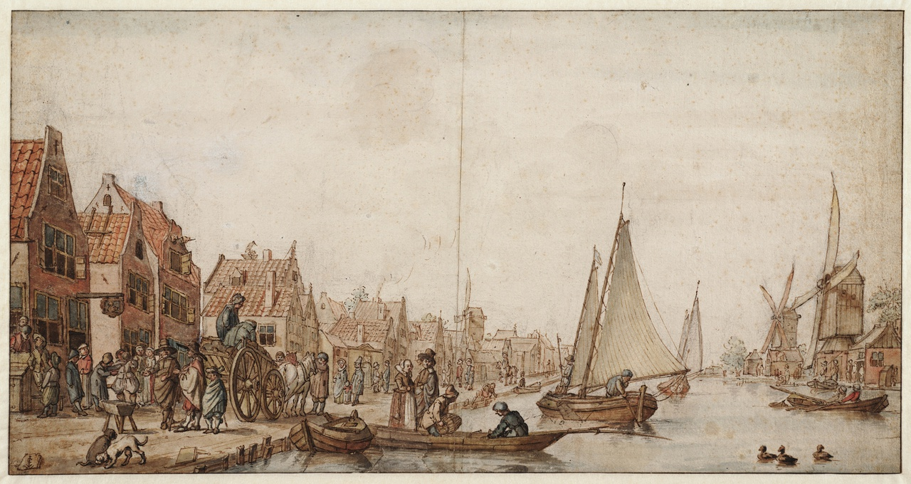 De Overtoomseweg (Heiligeweg) bij Amsterdam. Tekening op papier. Pen in bruin, penseel in waterverf, zwart krijt, pen in zwart. In bezit van het Teylers Museum in Haarlem.